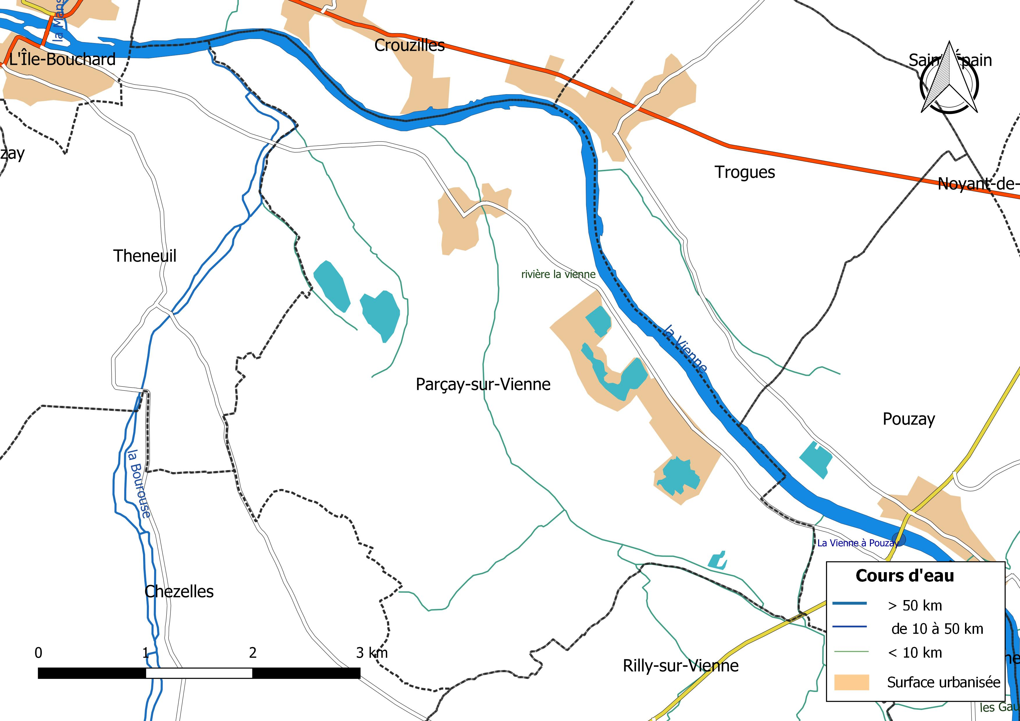 Carte du réseau hydrographique de la commune de Parçay-sur-Vienne (France).